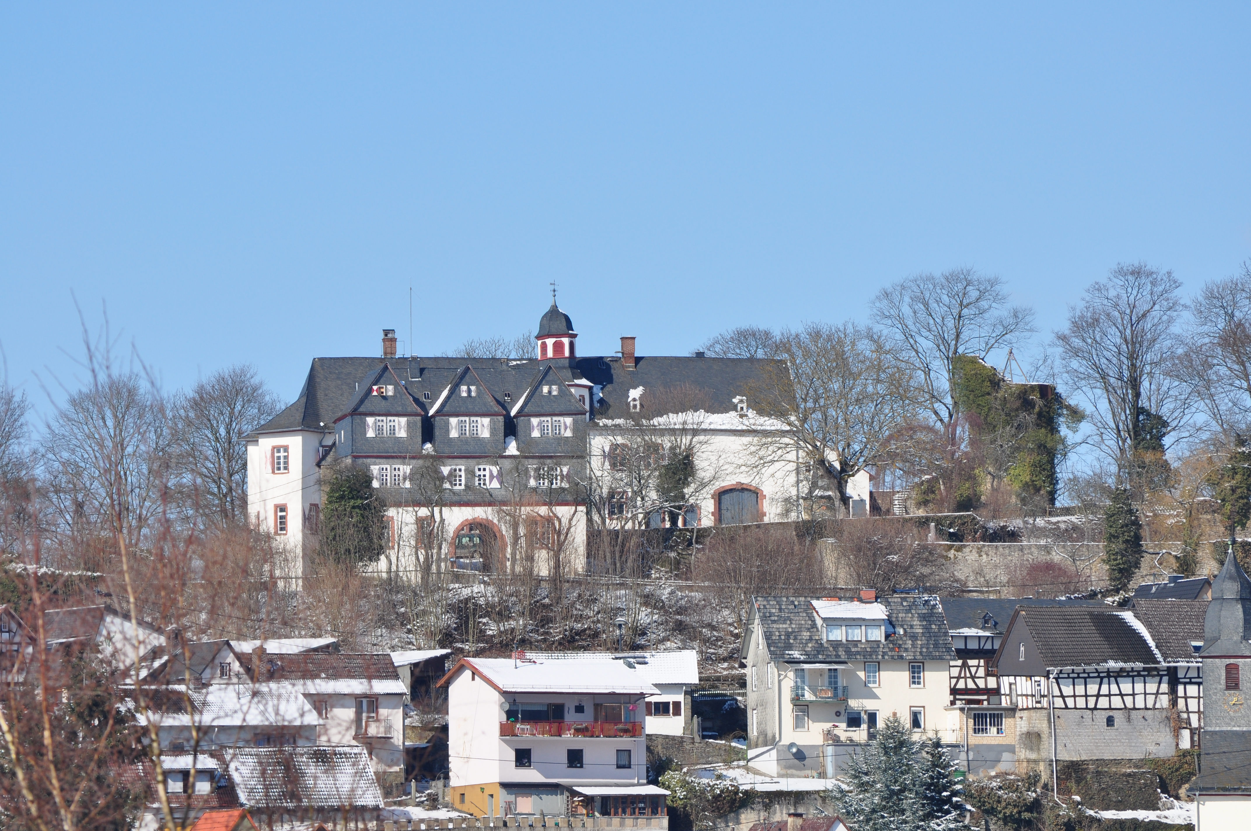 Gesamtansicht, Schloss Neuweilnau, Weilrod, Hessen, Deutschland war u.a. Geburtsort von Philipp III. (Nassau-Weilburg) (1504-1559), dem Erbauer der Residenz Weilburg. Es wurde von einem seiner Söhne, Philipp IV. (Nassau-Weilburg) (1542-1602), von 1564-1566 als Residenz ausgebaut, bevor dieser 1571 seine Residenz von Neuweilnau nach Saarbrücken wegen eines Erbfalls verlegte.